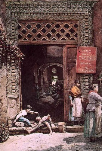 Ingresso della Casa dei Castellani in Rome (rione Trastevere)